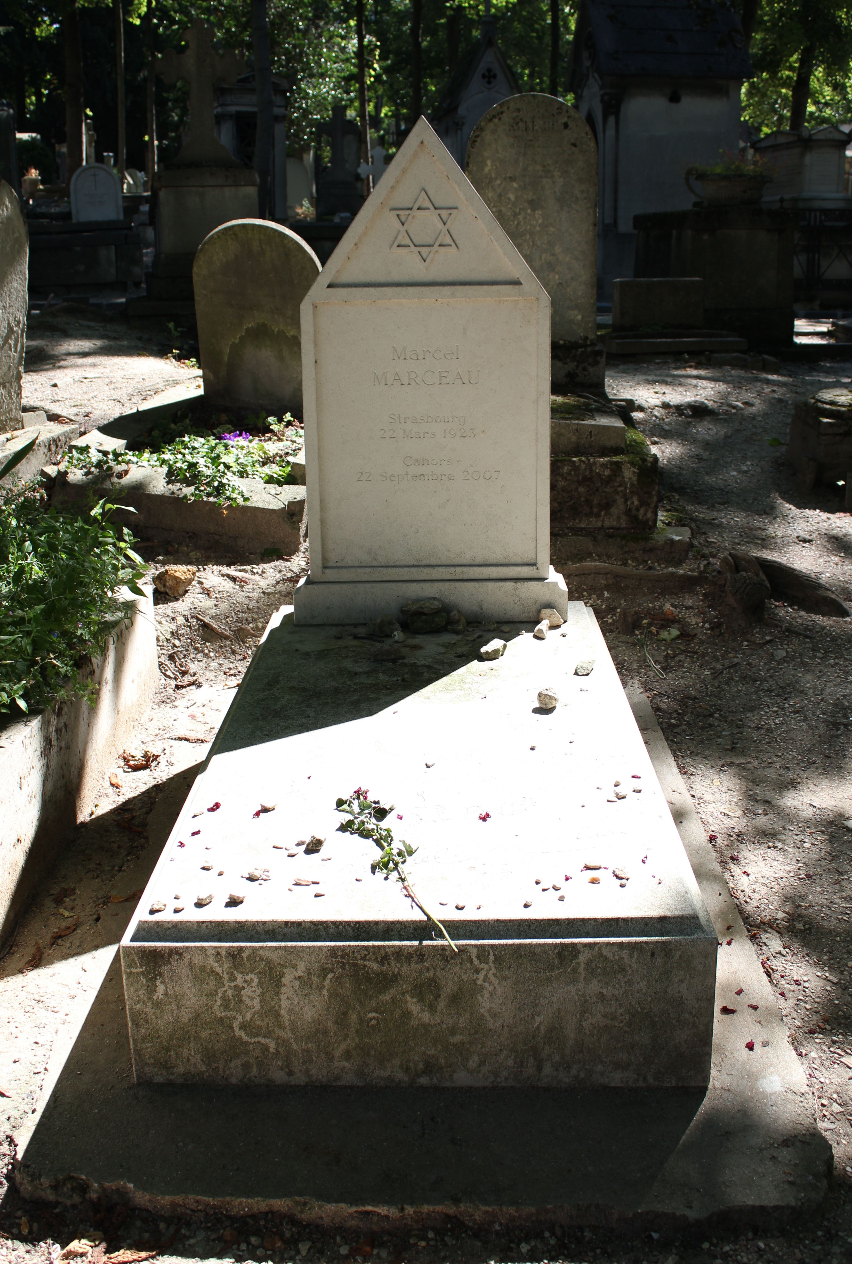 Sépulture de Marcel Marceau (1923-2007), dit le mime Marceau.